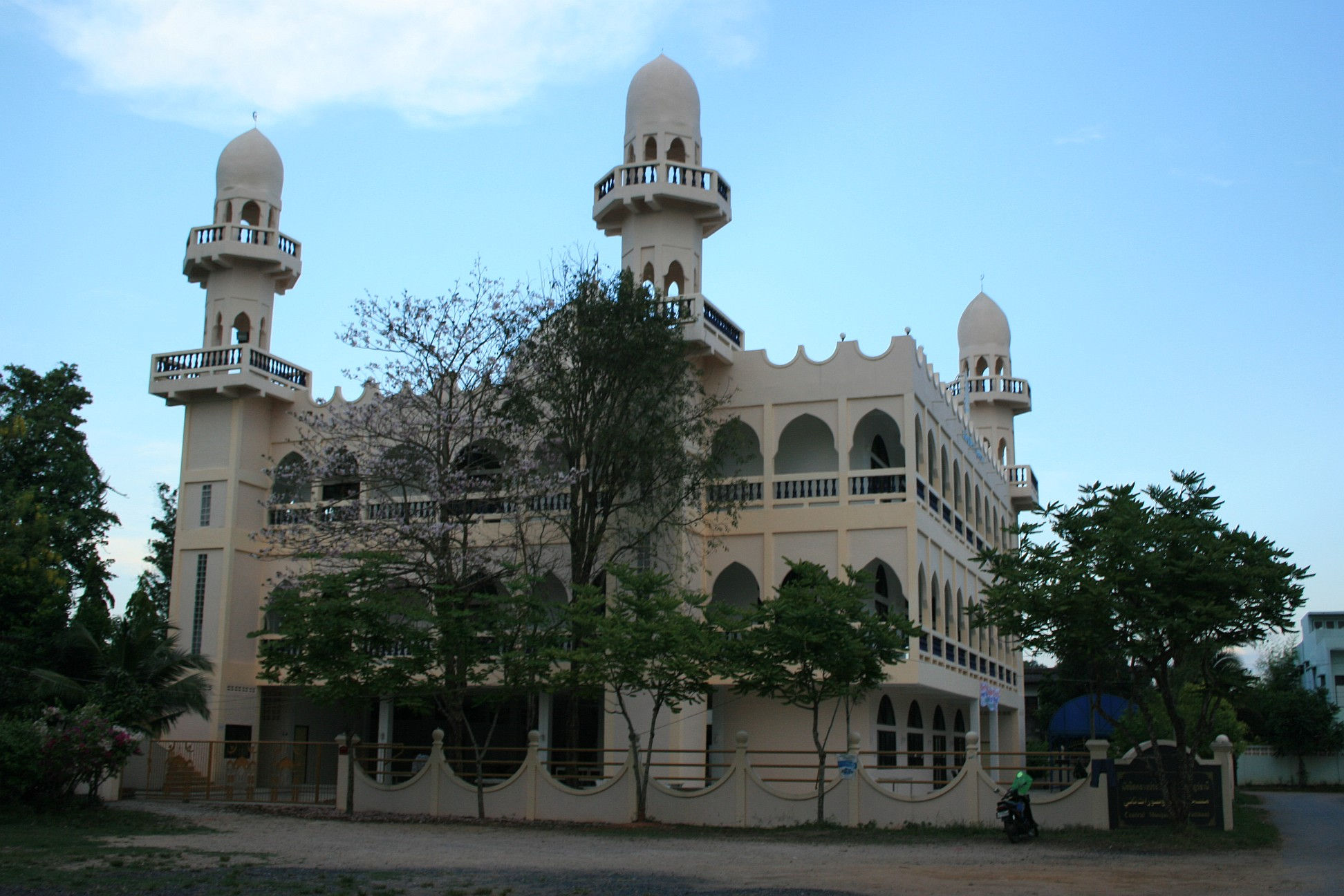 Surat Thani Mosque